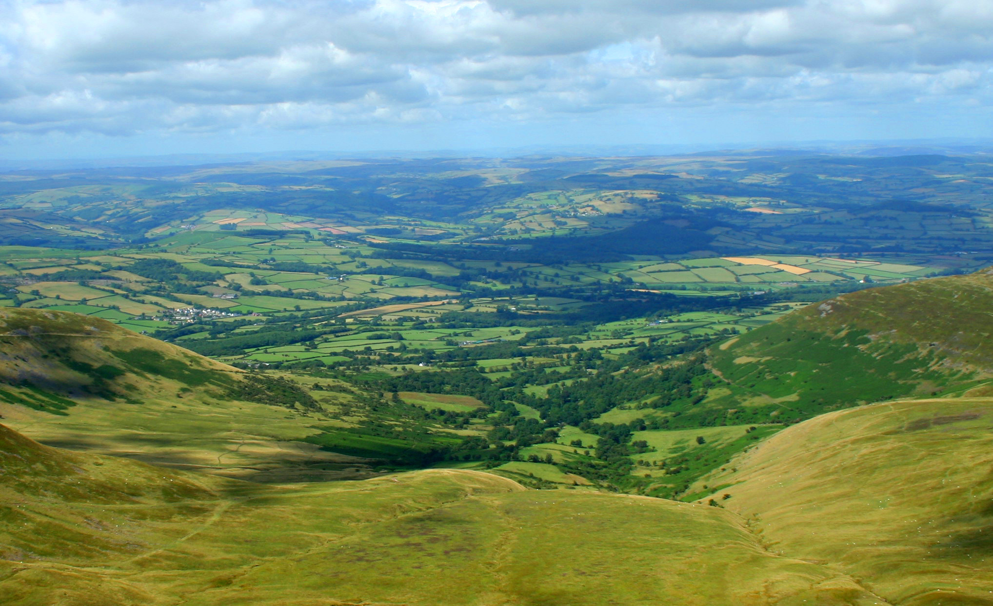 Heckenlandschaft nördlich des Corn Du (Brecon-Beacons-Nationalpark, Wales)